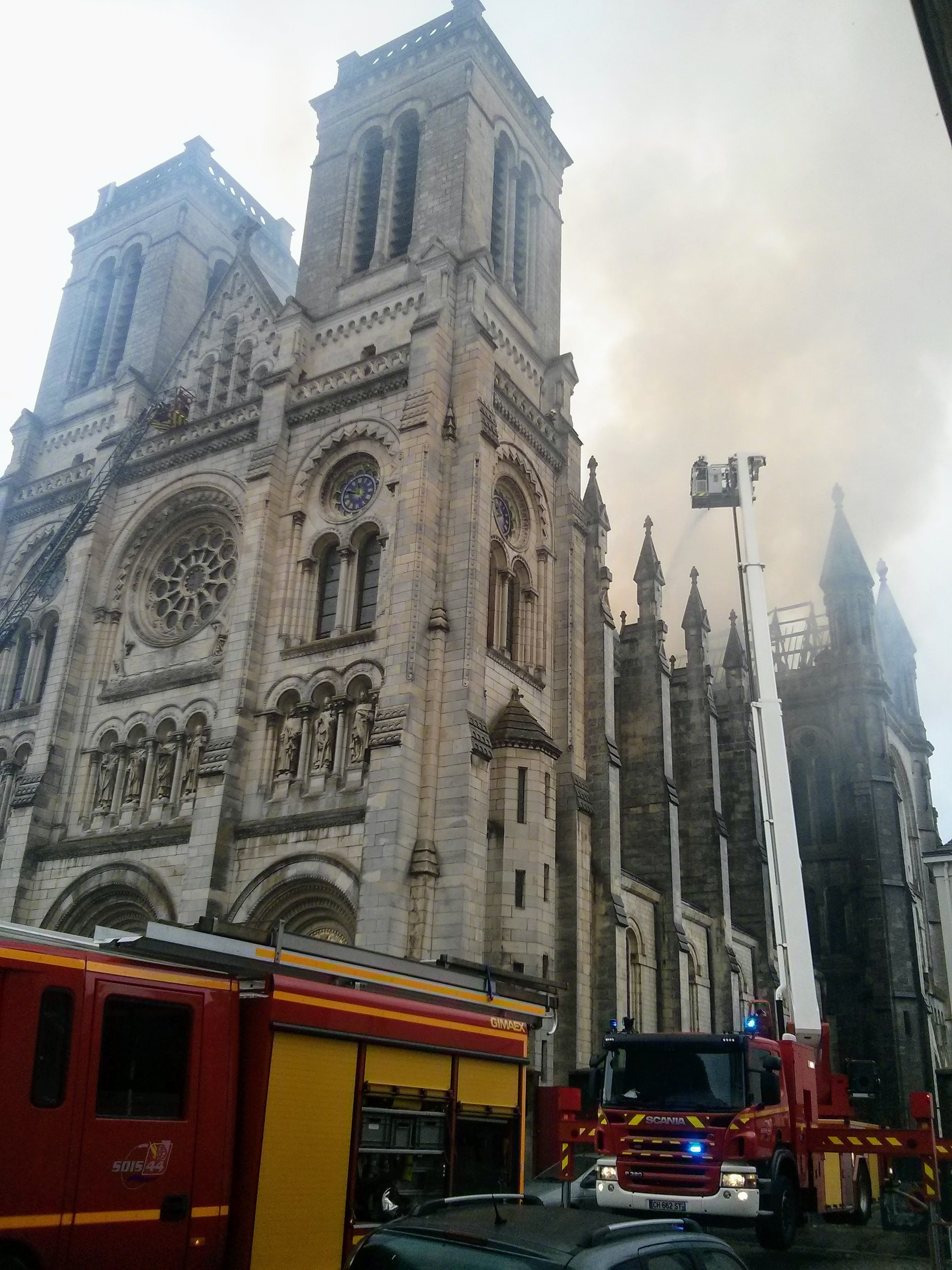 Incendie du 15 juin 2015 de la Basilique Saint-Donatien et Saint-Rogatien, façade coté sud